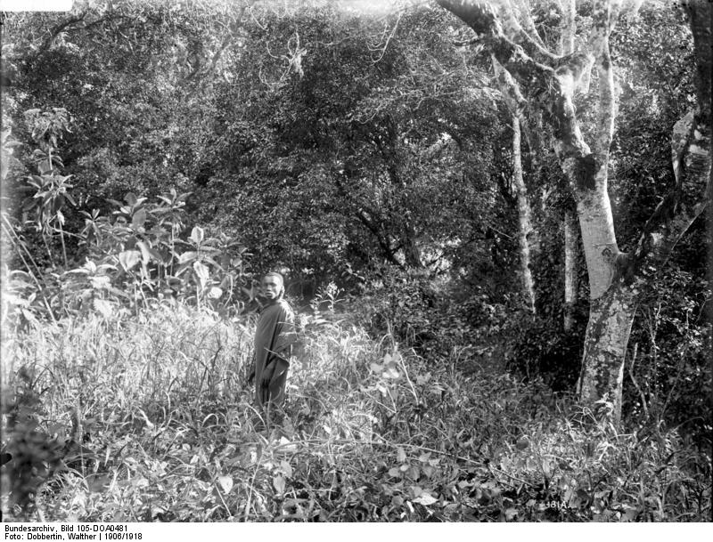 Urwald am Meru